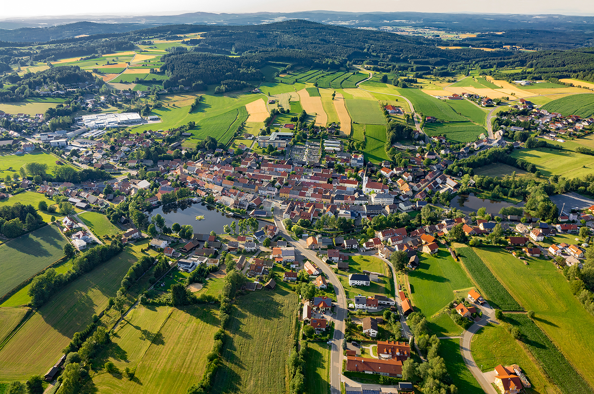 Aufnahme von der Weidinger Straße nach Nordwesten